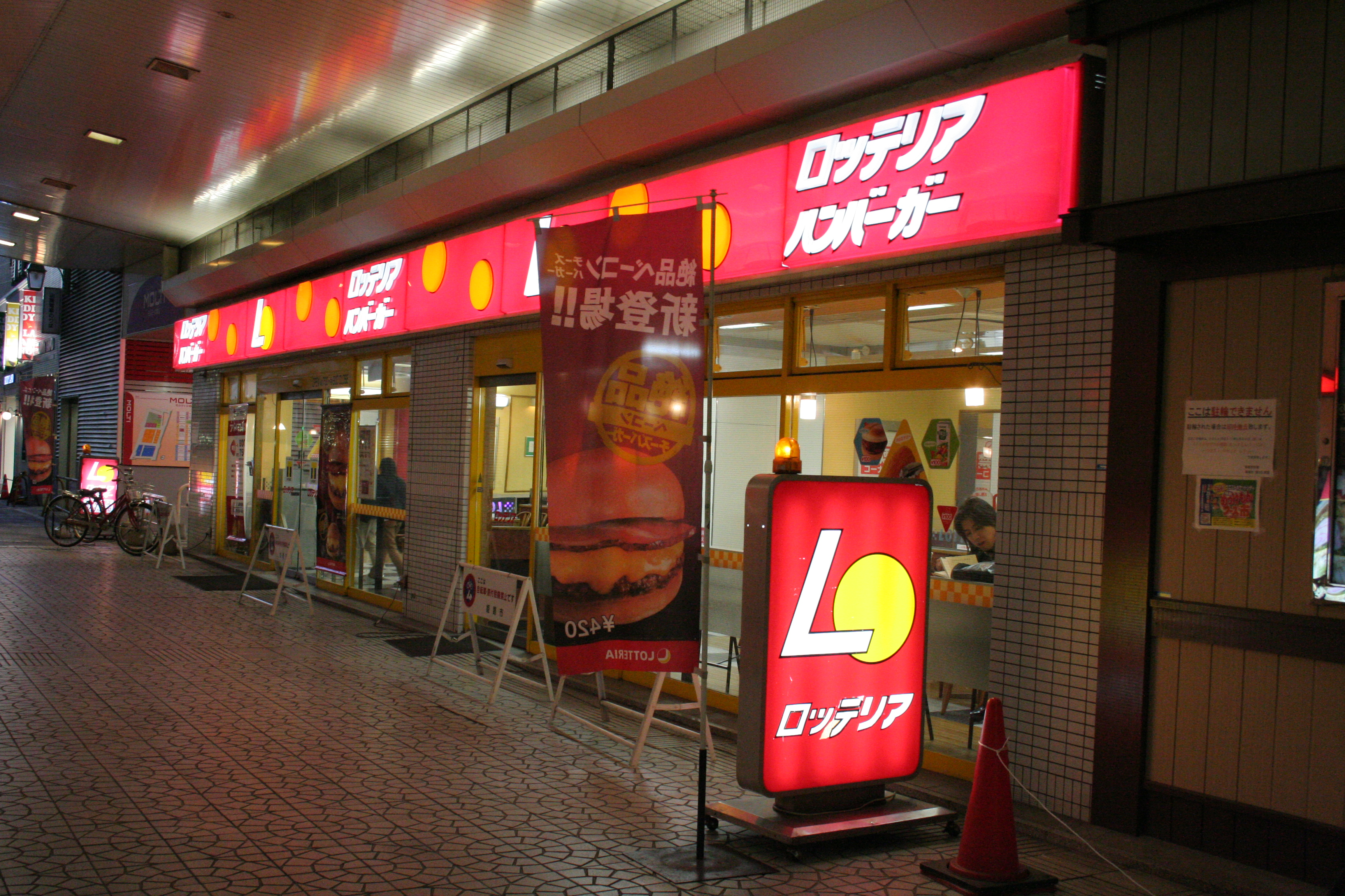 兵庫県南西部にある店舗など。 山陽百貨店の1階通路部分にあるロッテリア山陽姫路駅店。